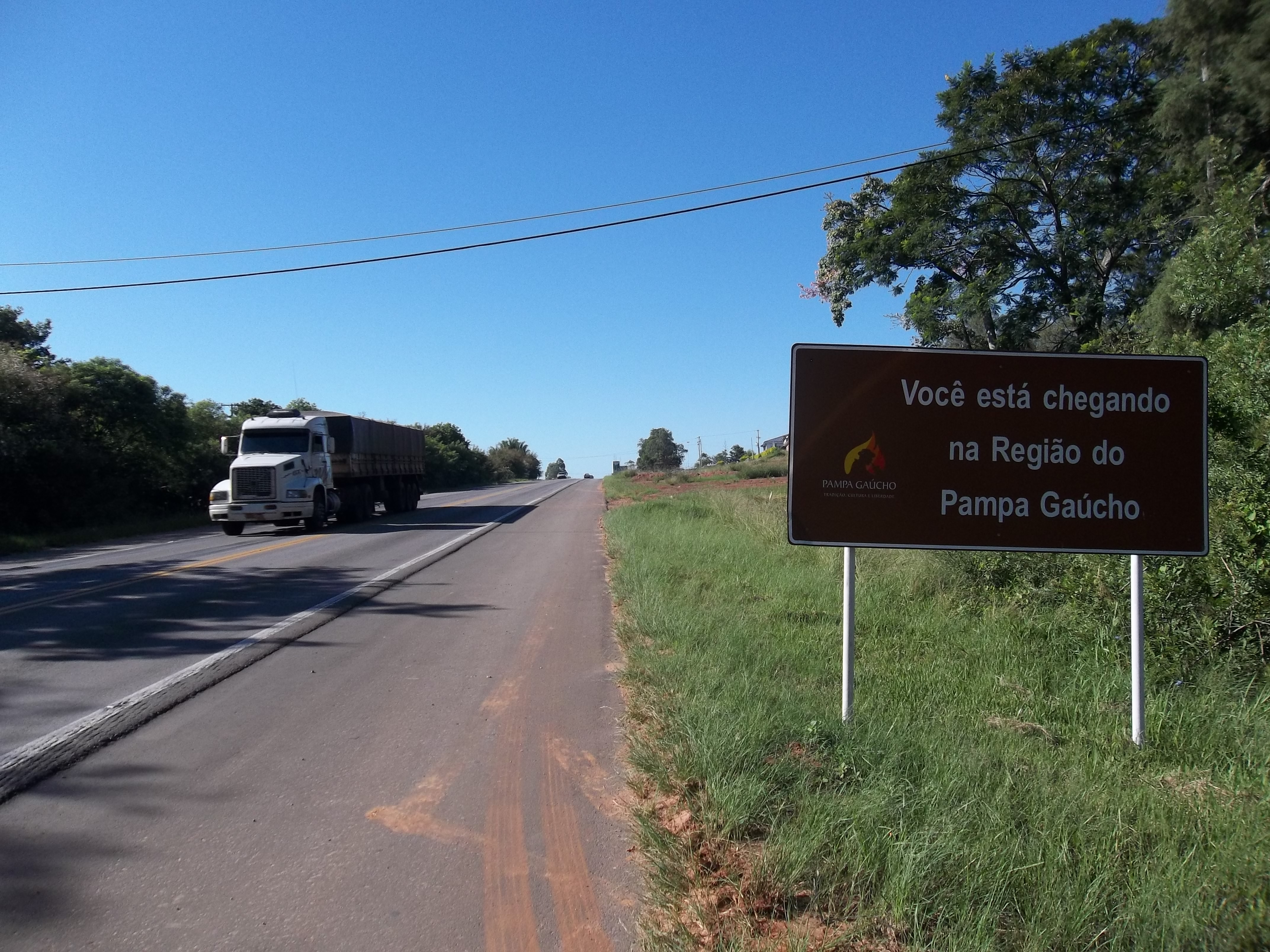 Placa da Região do Pampa Gaúcho. BR-392. Limite dos bairros Tomazetti (a esquerda) e Lorenzi (a direita). Santa Maria, RS - Brasil